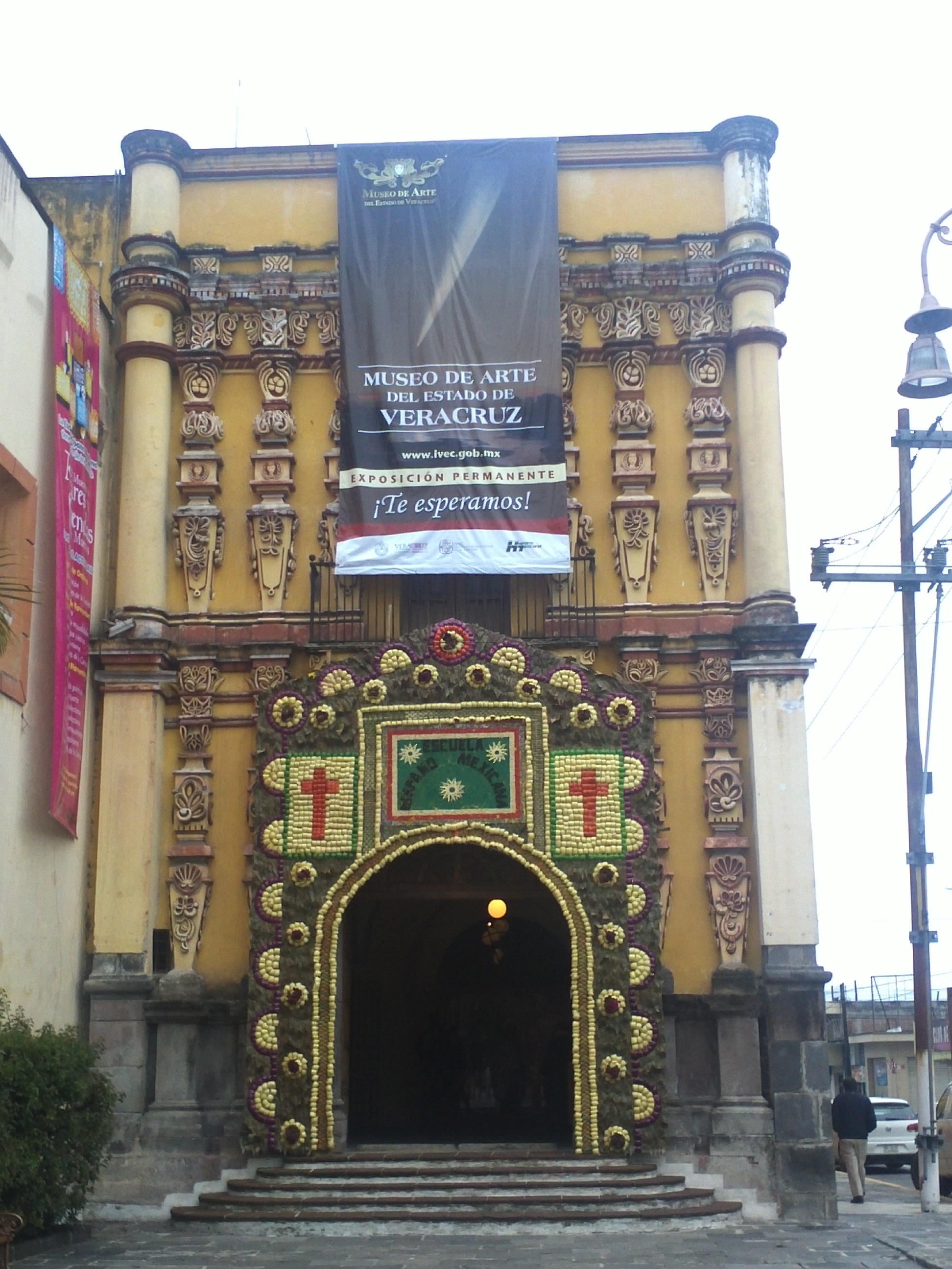 Museo de arte del estado de Veracruz con sede en la ciudad de Orizaba